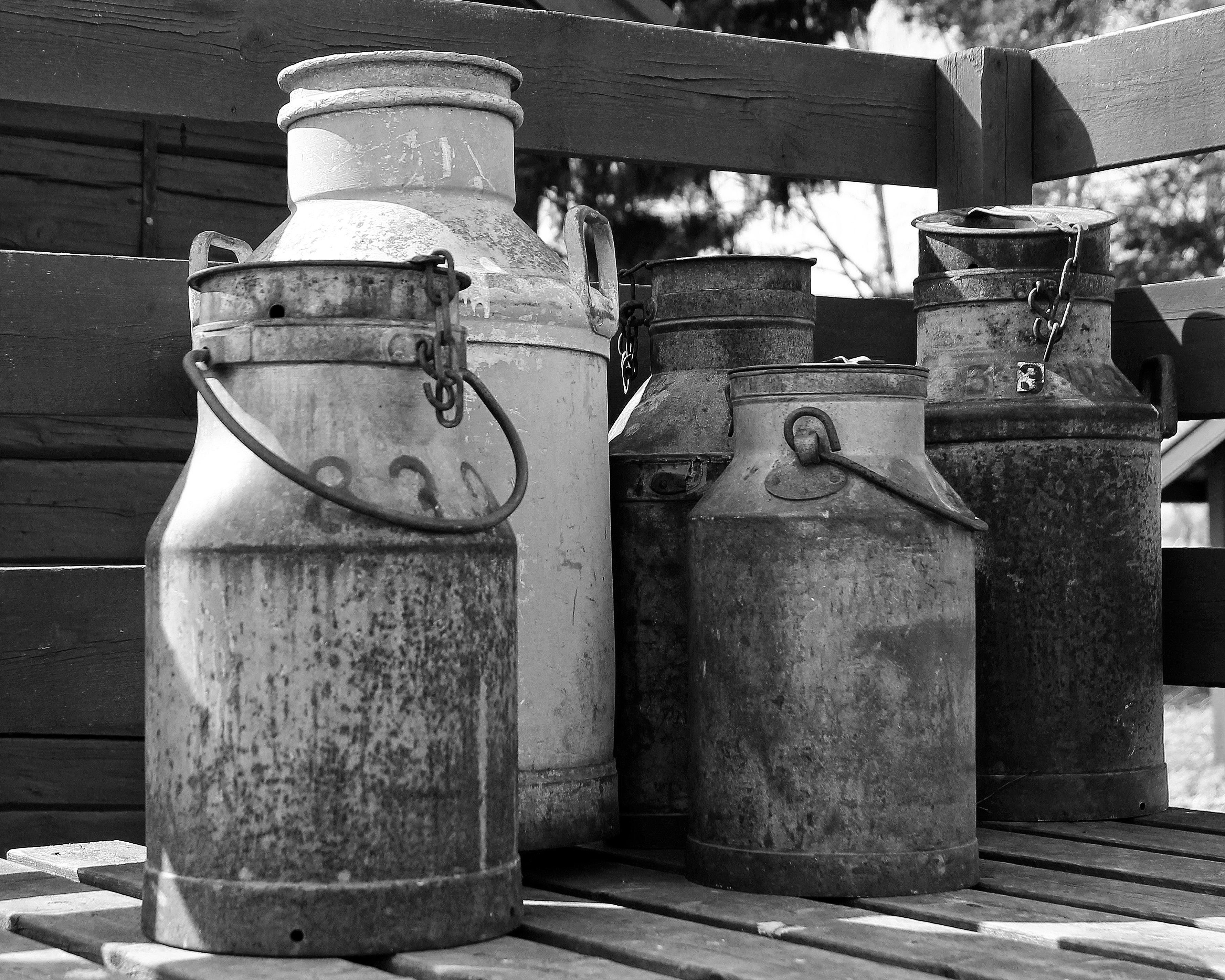 Mjölkkrukor också mjölkkannor eller mjölkflaskor.